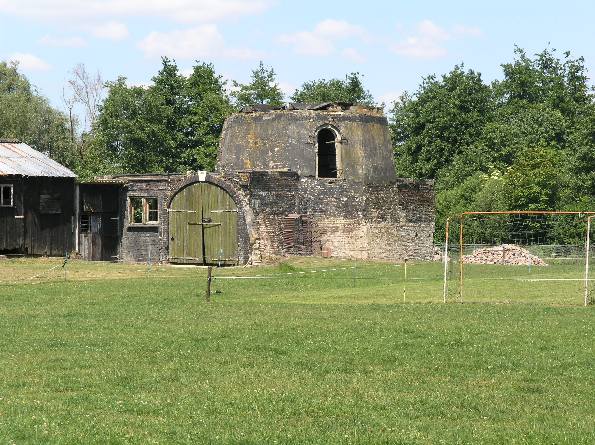 Keldonk De Hoop Molenrestant